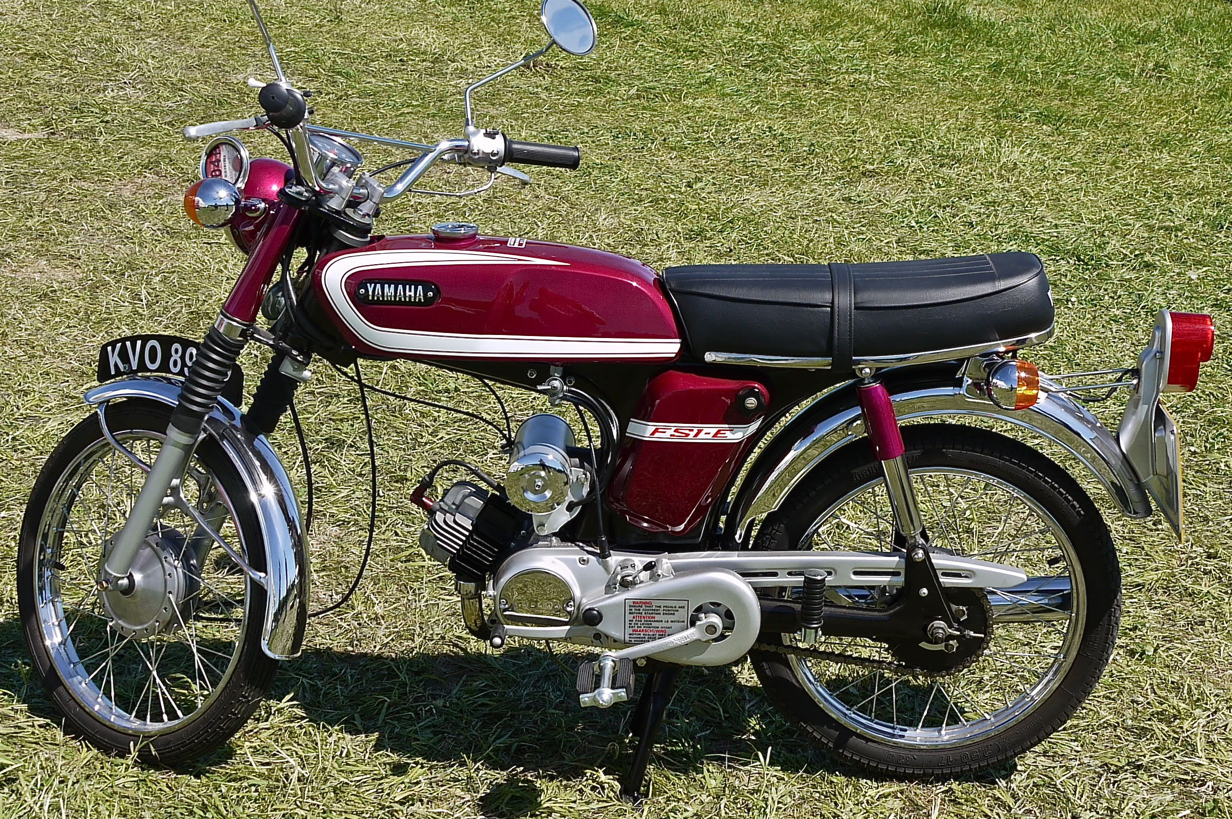 Panasonic G1 14-45 Lens